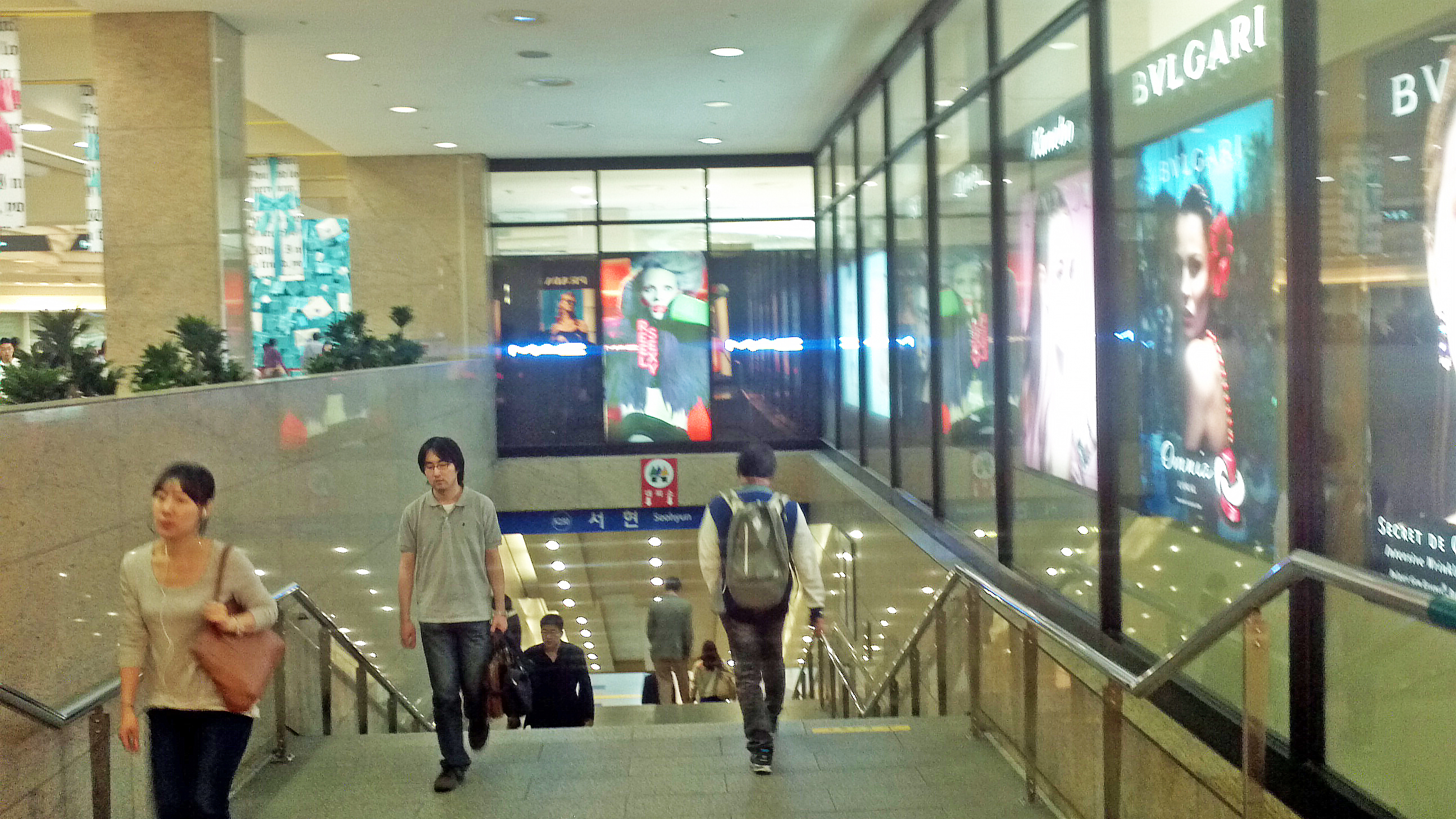 서현역 1번출구